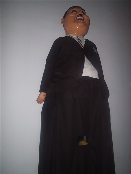 Gigantes de Alcalá de Henares